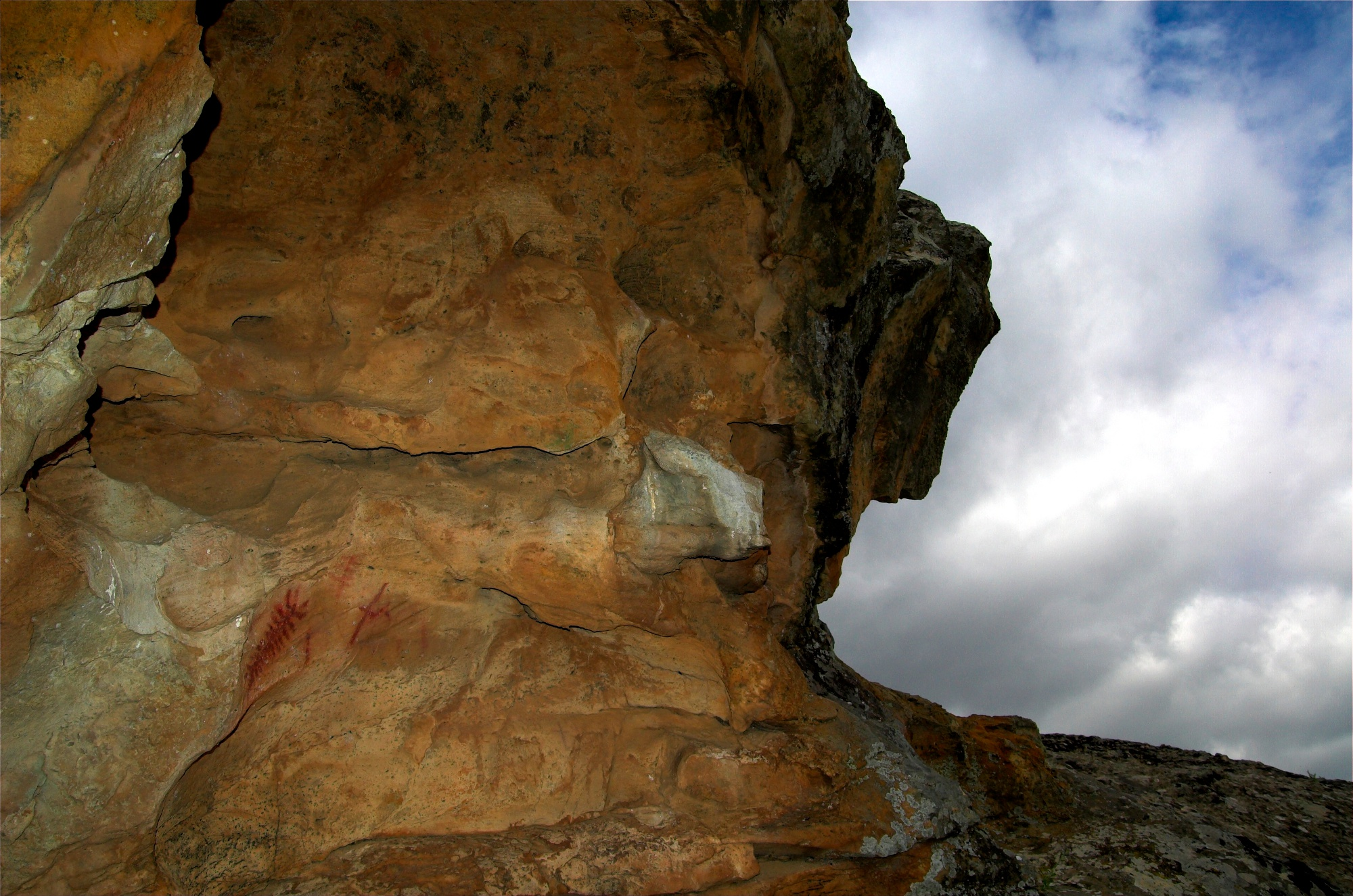 Pinturas rupestres de las Piedras de Cabrera (Casabermeja).